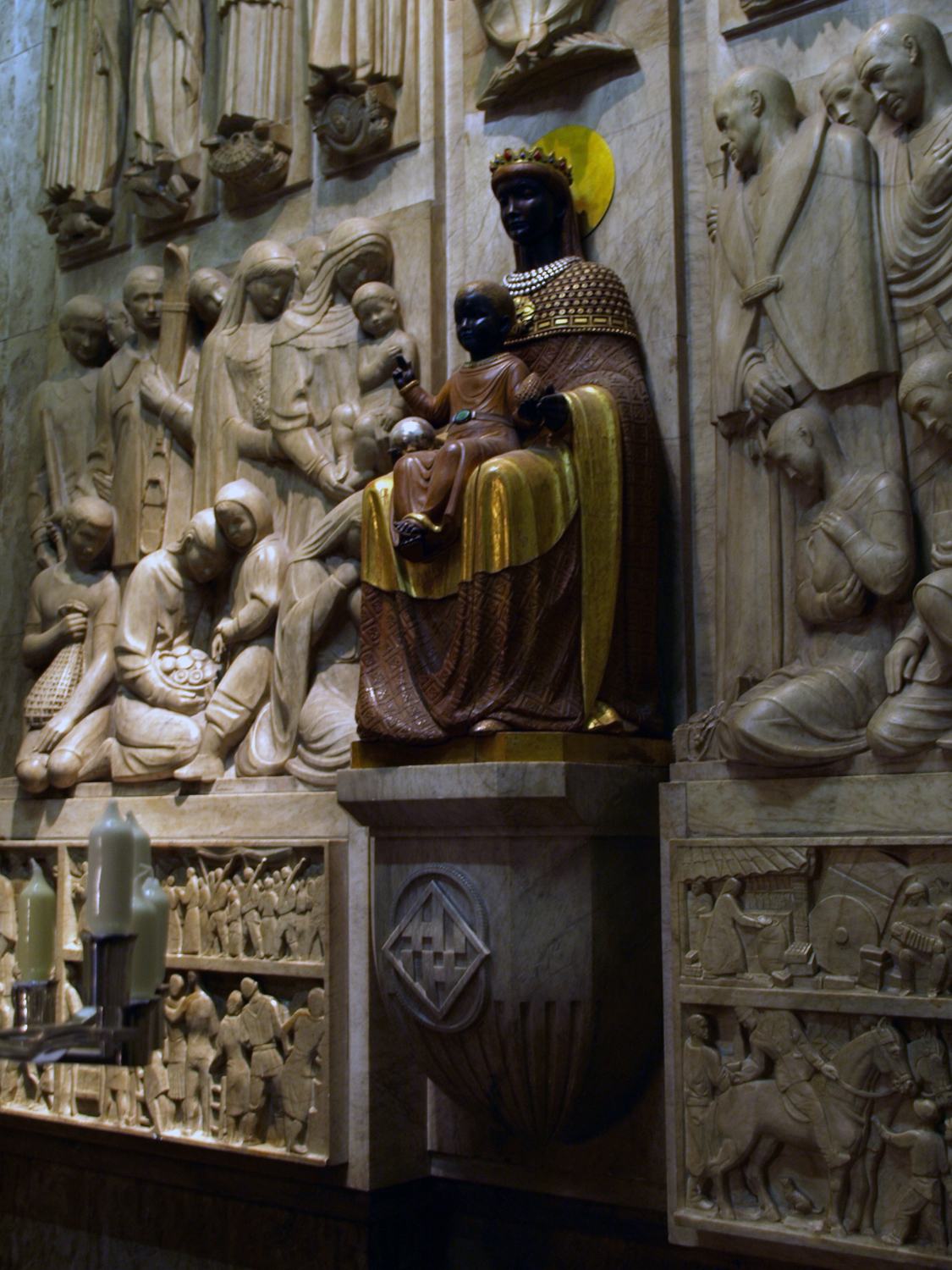 Capella del Bon Consell (Ajuntament de Barcelona)